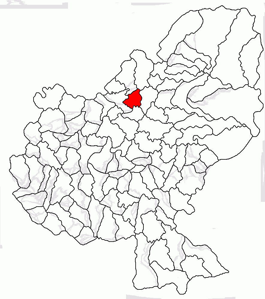 Categorie:Hărţi ale judeţului Mureş